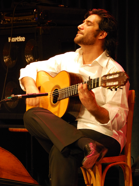 Niño Josele in concert, 2008